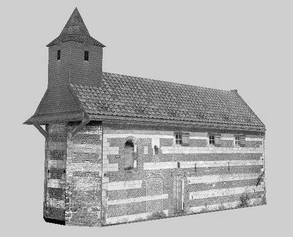 Afbeelding van de Kluiskerk te Geleen.